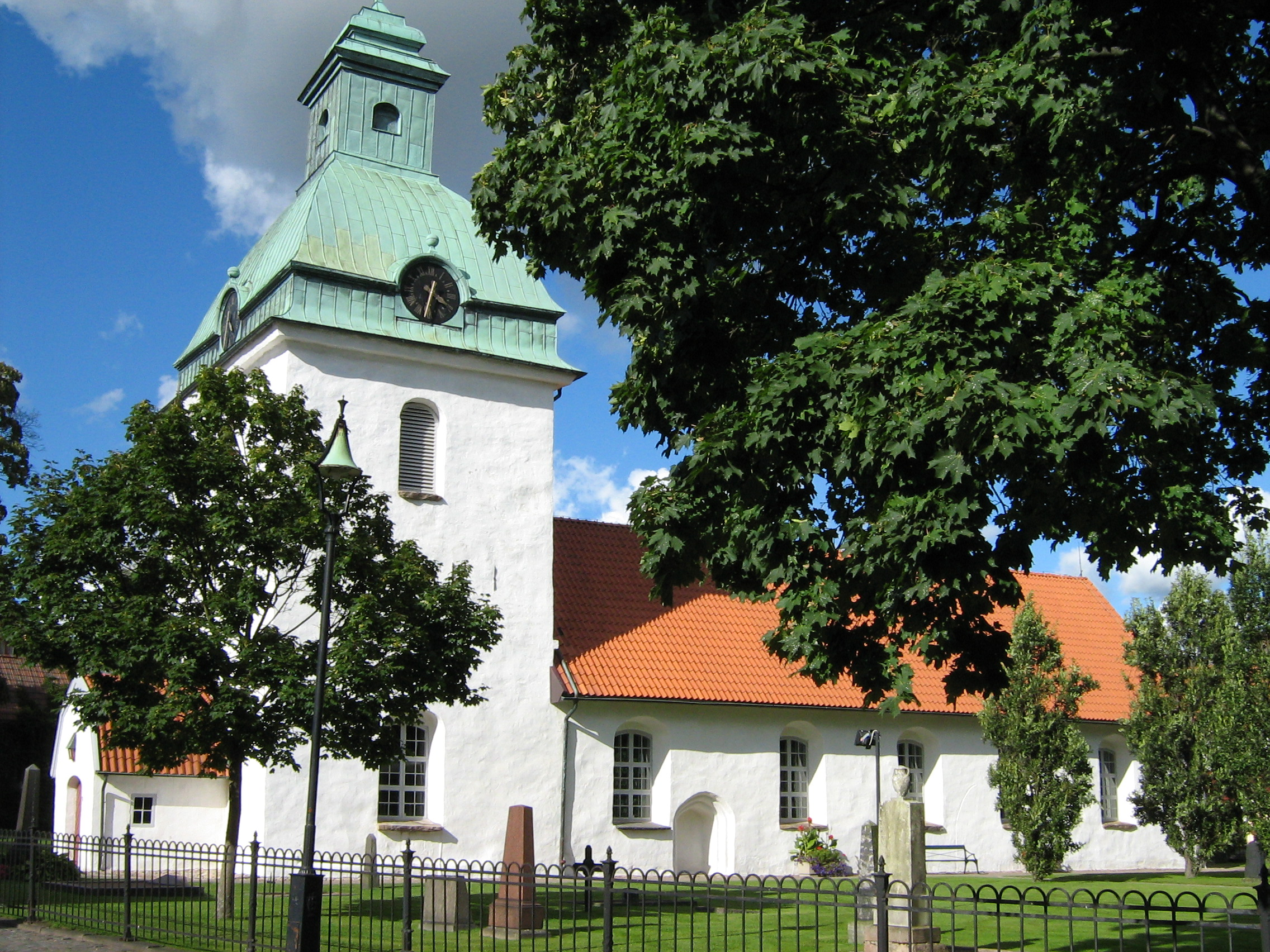 Sankt Laurentii kyrka, Falkenberg, Sverige.